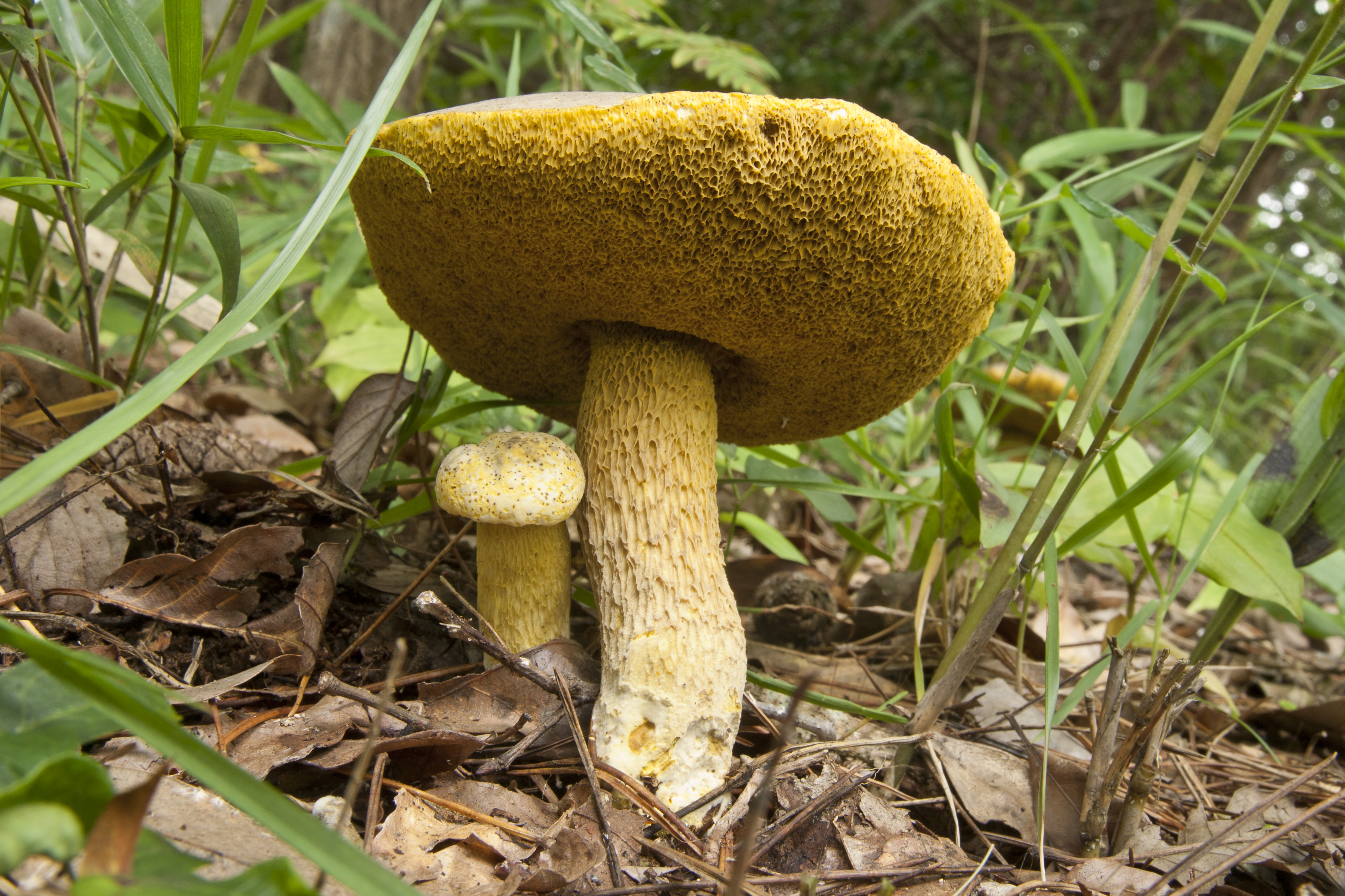 キアミアシイグチ属 キアミアシイグチ (学名:Retiboletus ornatipes)